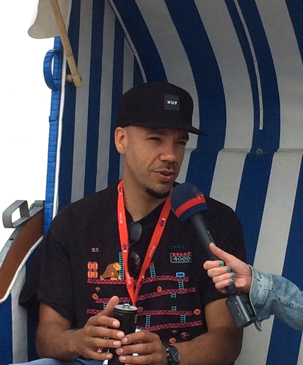 Larsito im Interview